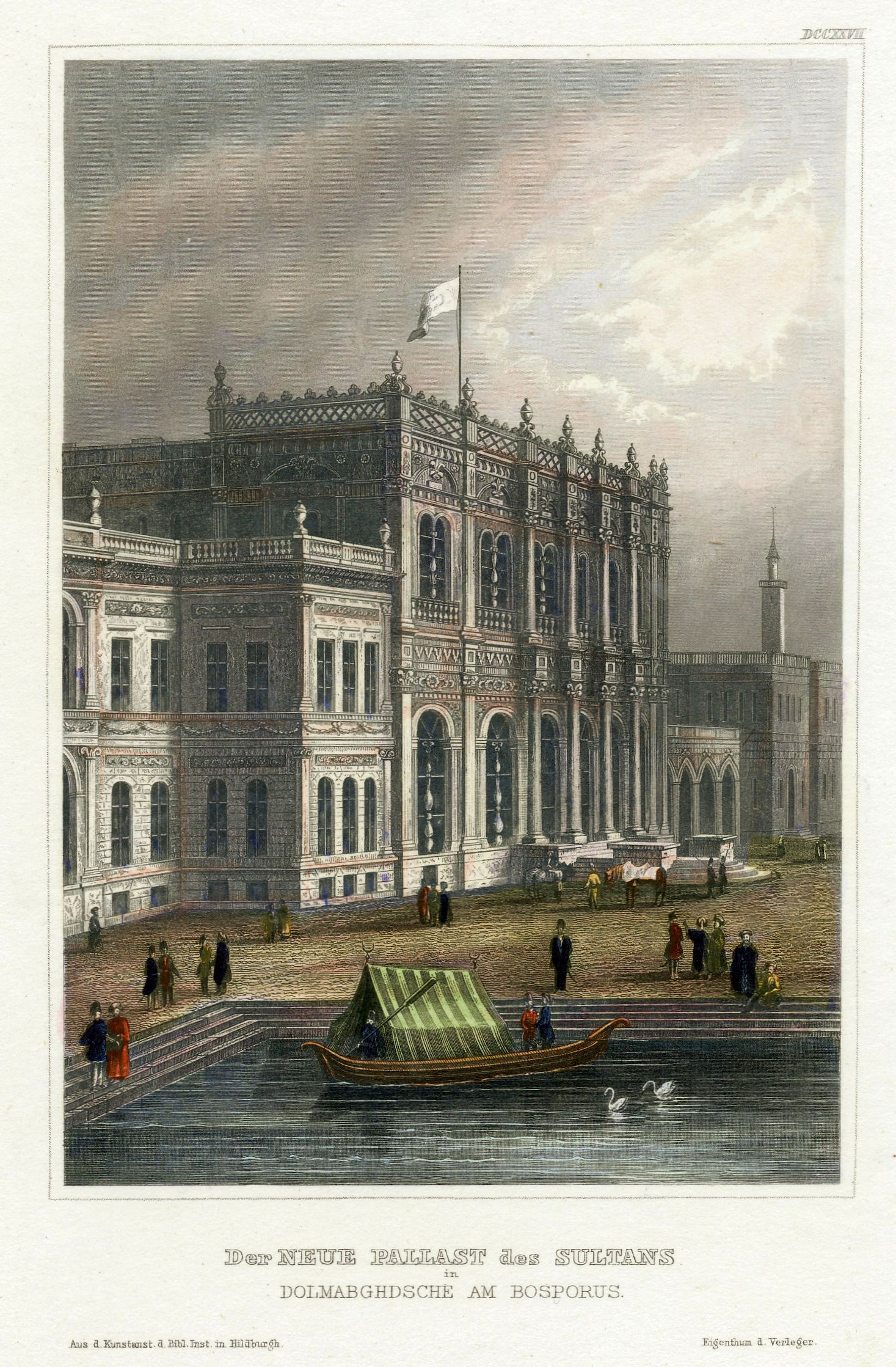 Sultan'ın yeni sarayı Dolmabahçe.